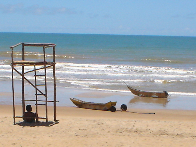 Cidade de São Mateus, Espírito Santo, Brasil.